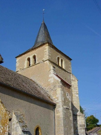 L'église de la Sainte Trinité, Magny-Lormes, Nièvre, France.